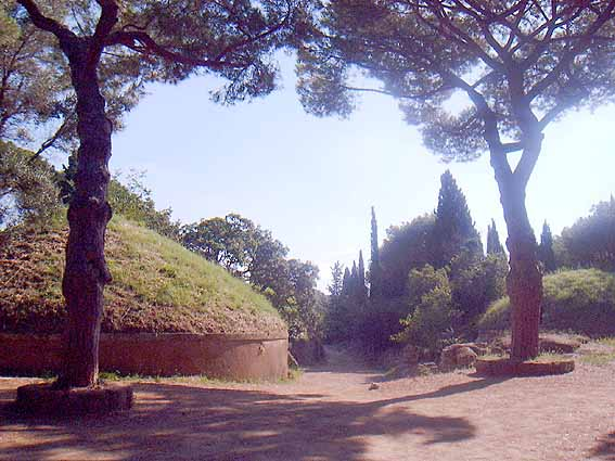 Necropoli della Banditaccia a Roma